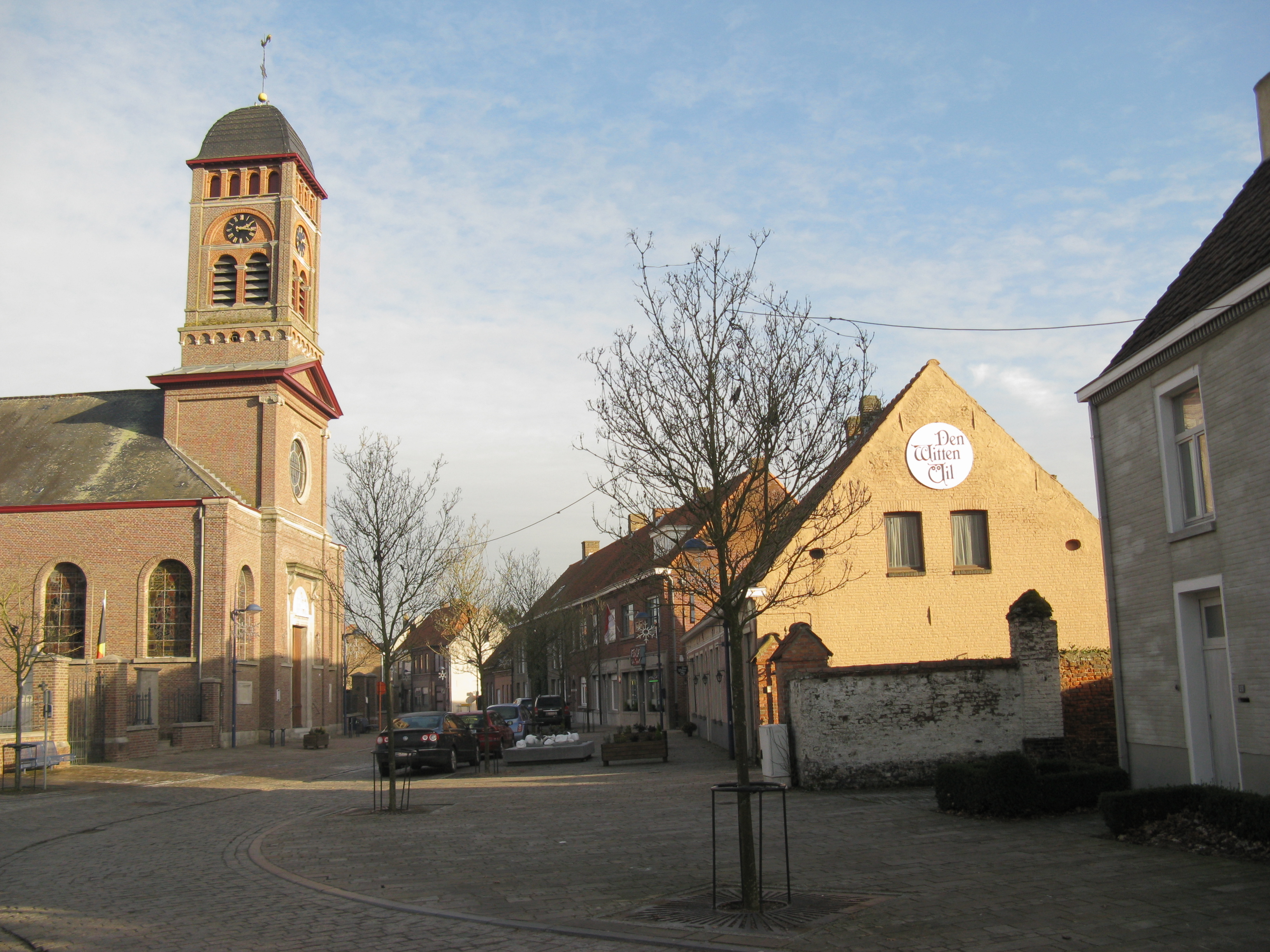 Dorpskom van Vinderhoute, België.